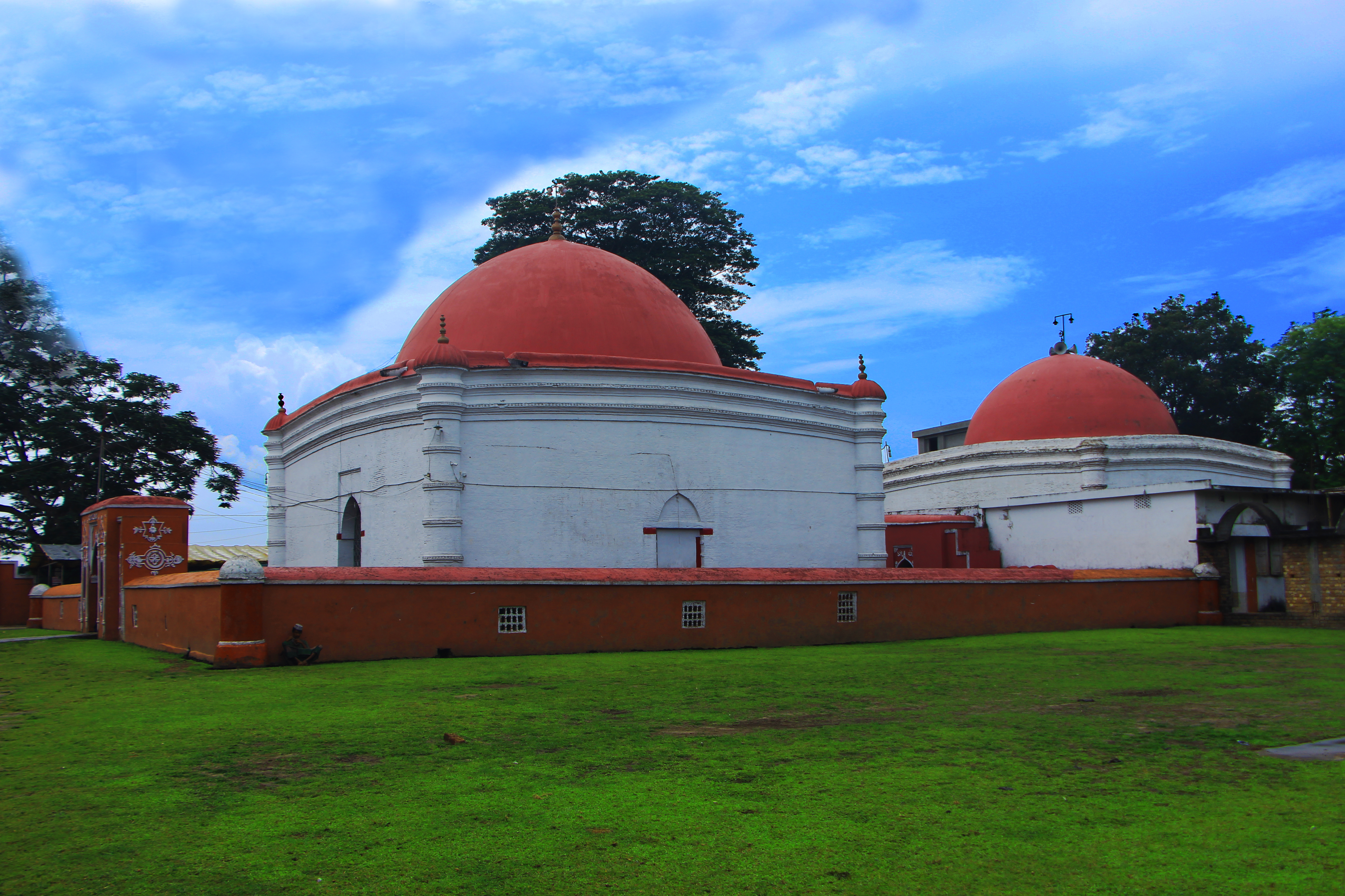 খাজা খানজাহান আলি (র:) মাজার বাগেরহাট